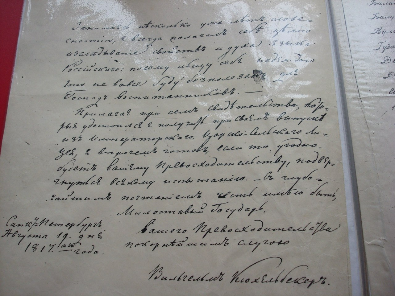 Ксерокопия прошения Вильгельма Кюхельбекера о предоставлении ему должности преподавателя словесности в Благородном пансионе при Главном педагогическом институте, 19 августа, 1817 г. (оригинал находится в ЦГИА СПб, ф. 13, оп. 1, ед. хр. 1793)